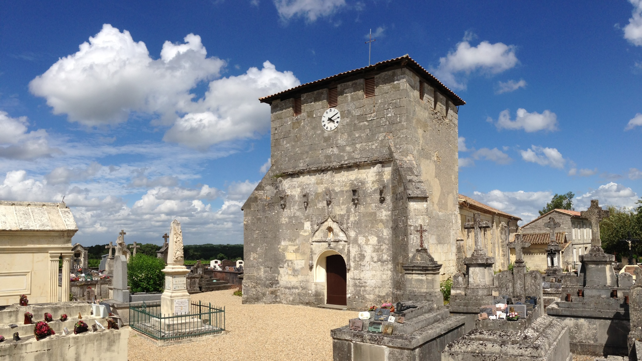 Eglise Ste Croix de Bayas, Gironde - France - Juillet 2013